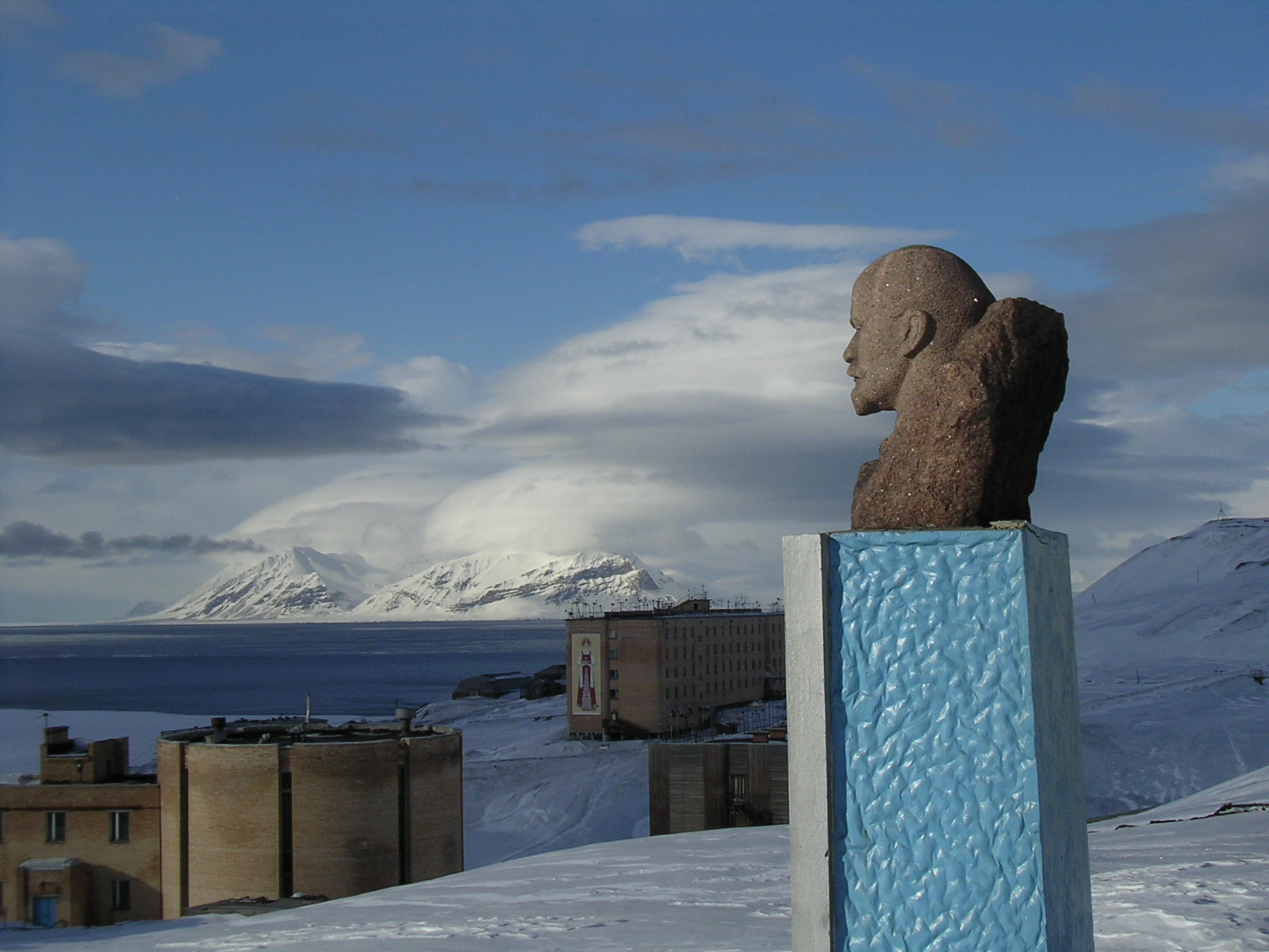 памятник В.И.Ленину в пос. Баренцбург (Шпицберген)